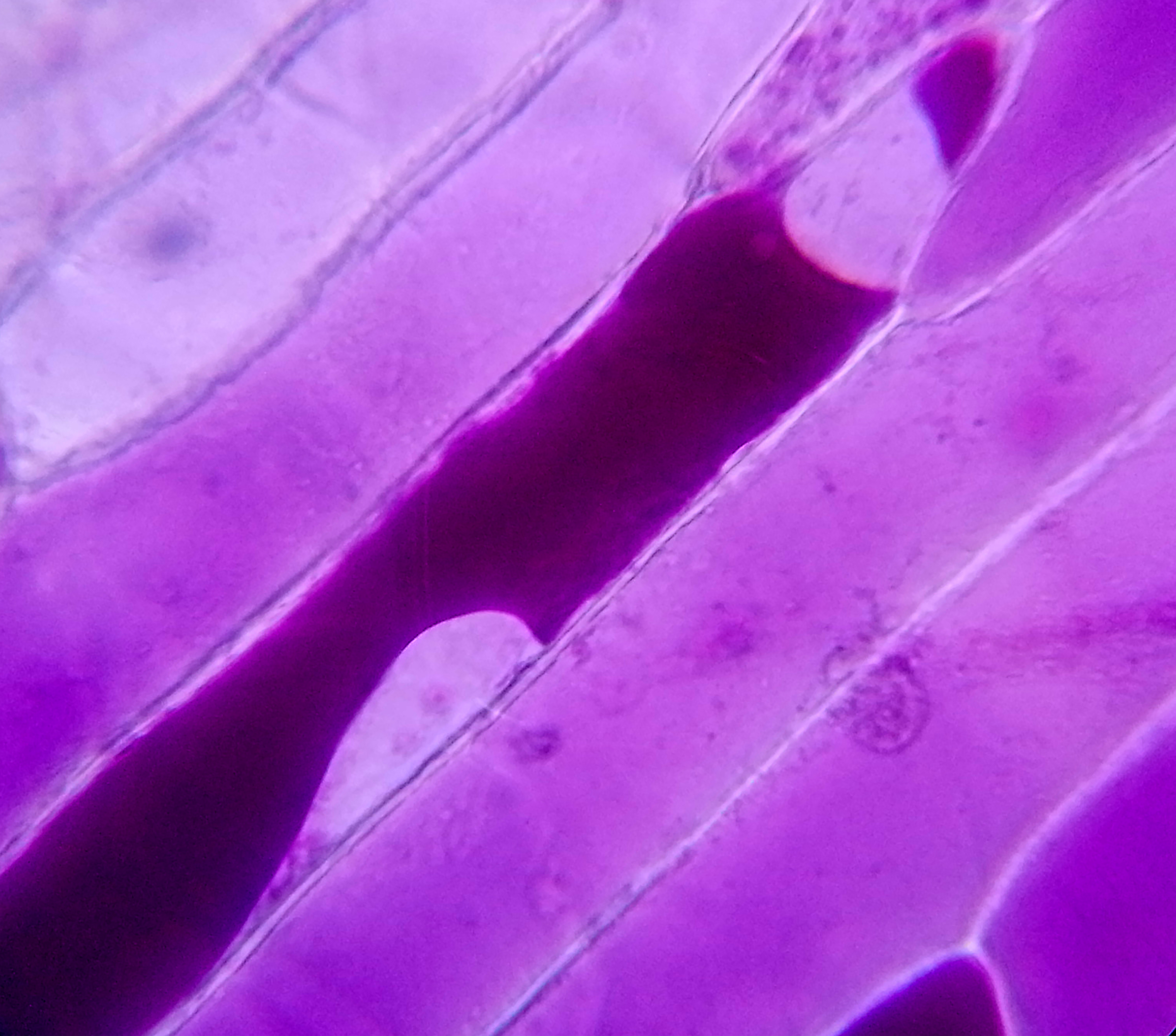 Durch Salzlösung bedingtem Wasserentzug entstehen bei der betroffenen Zelle (dunkel-lila eingefärbt) einige Einkerbungen. Die Zelle nimmt dabei keinen Schaden. Bei erneuter Wasserzufuhr dehnt sich die Zelle wieder aus. (Osmose)